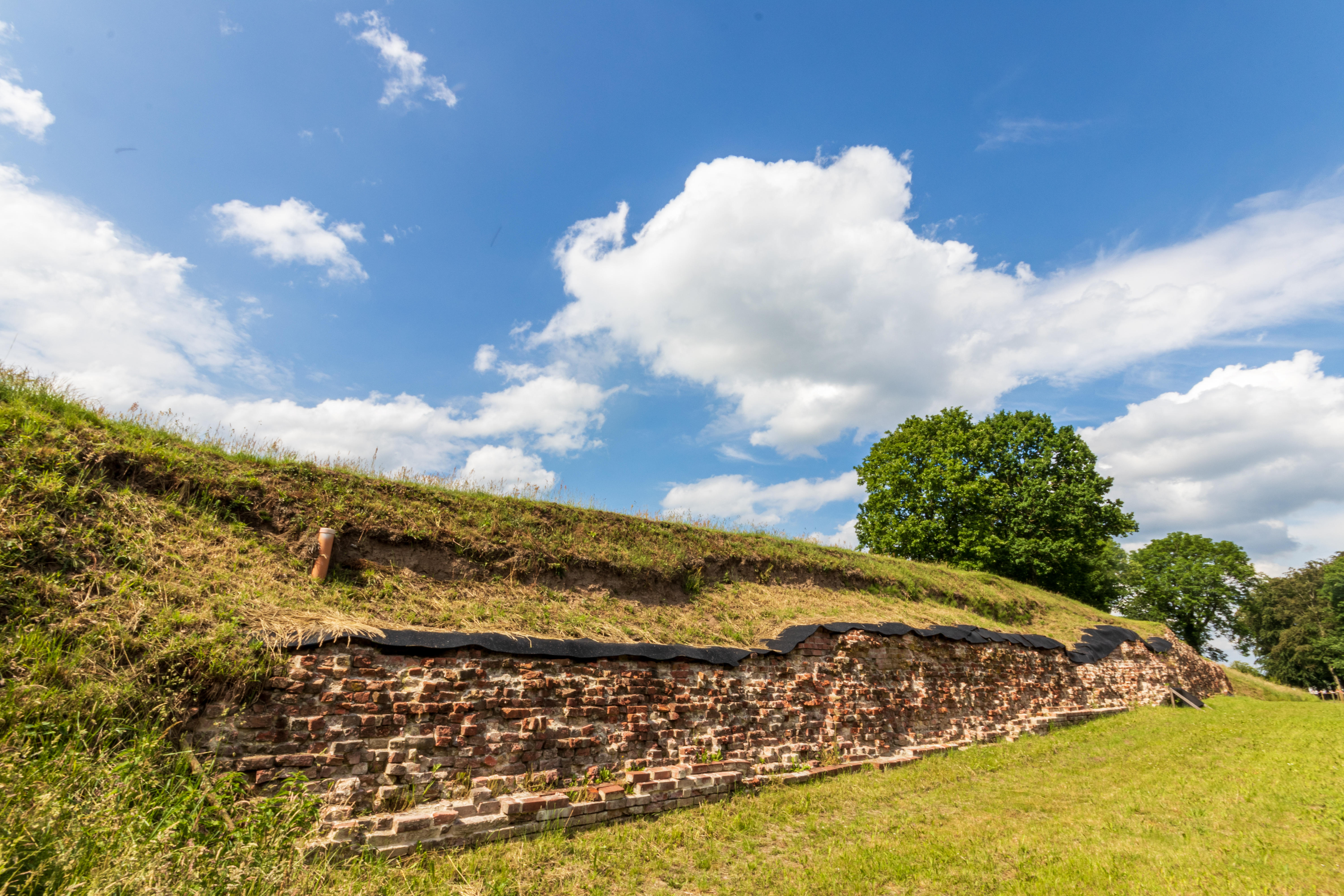 Die Waldemarsmauer des Danewerks in Dannewerk